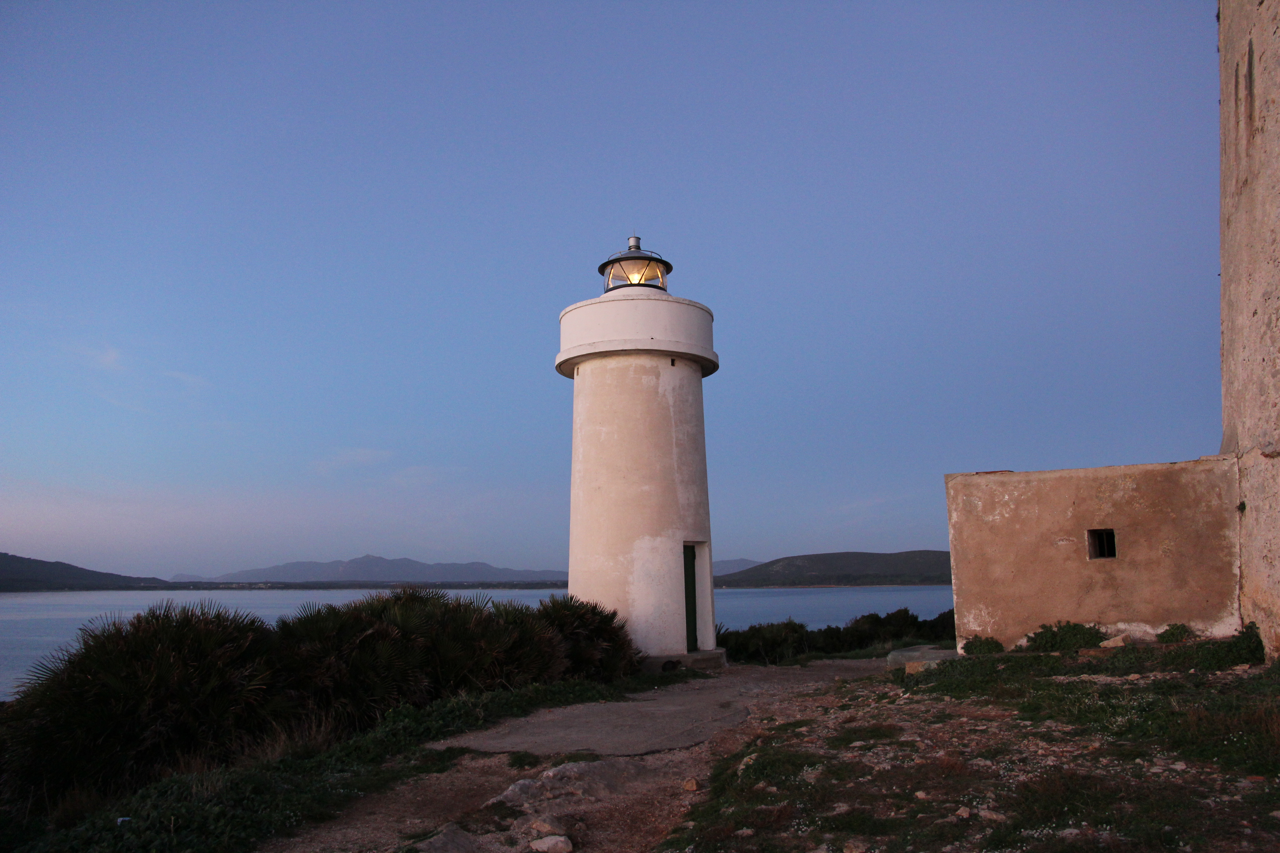 Alghero - Faro "Torre Nuova" di Porto Conte